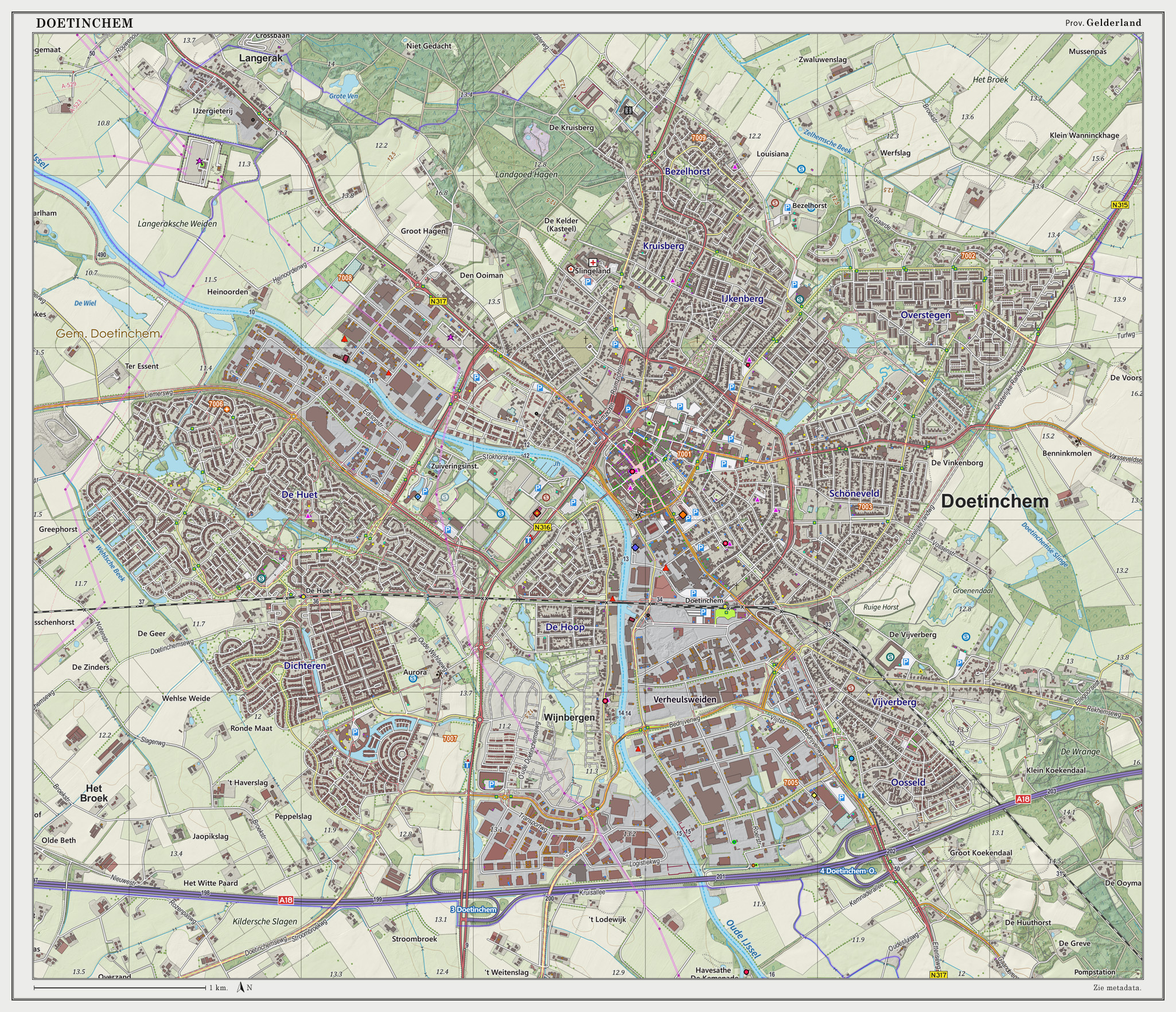 Topografische kaart van Doetinchem (woonplaats). Resolutie: 300 pixels/km. Kaartbeeld samengesteld uit de open geodata van de Top10NL en Top25namen (Basisregistratie Topografie, Kadaster), Creative Commons BY licentie. Gebouwvlakken uit open geodata BAG extract. Wegen uit de OpenStreetMap. Reliëfschaduw uit de Actuele Hoogtekaart AHN2. Samenstelling en kleurenschema: Jan-Willem van Aalst, met QGIS2. Zie ook de Legenda.